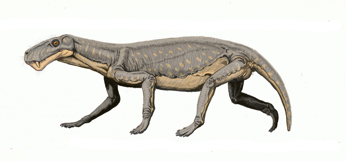 Lycaenops